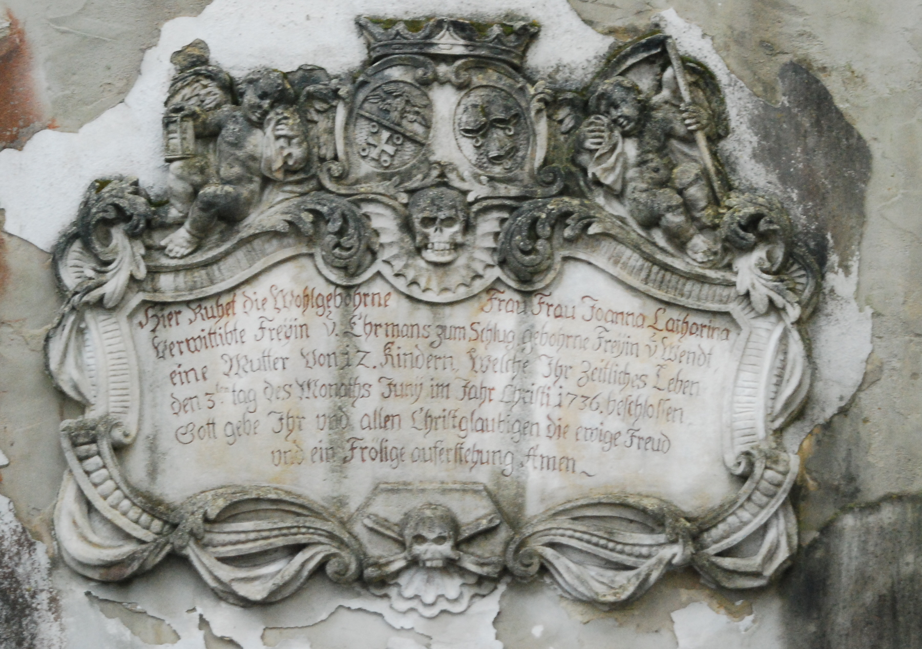 Grabtafel an der Pfarrkirche von Franzen in Niederösterreich